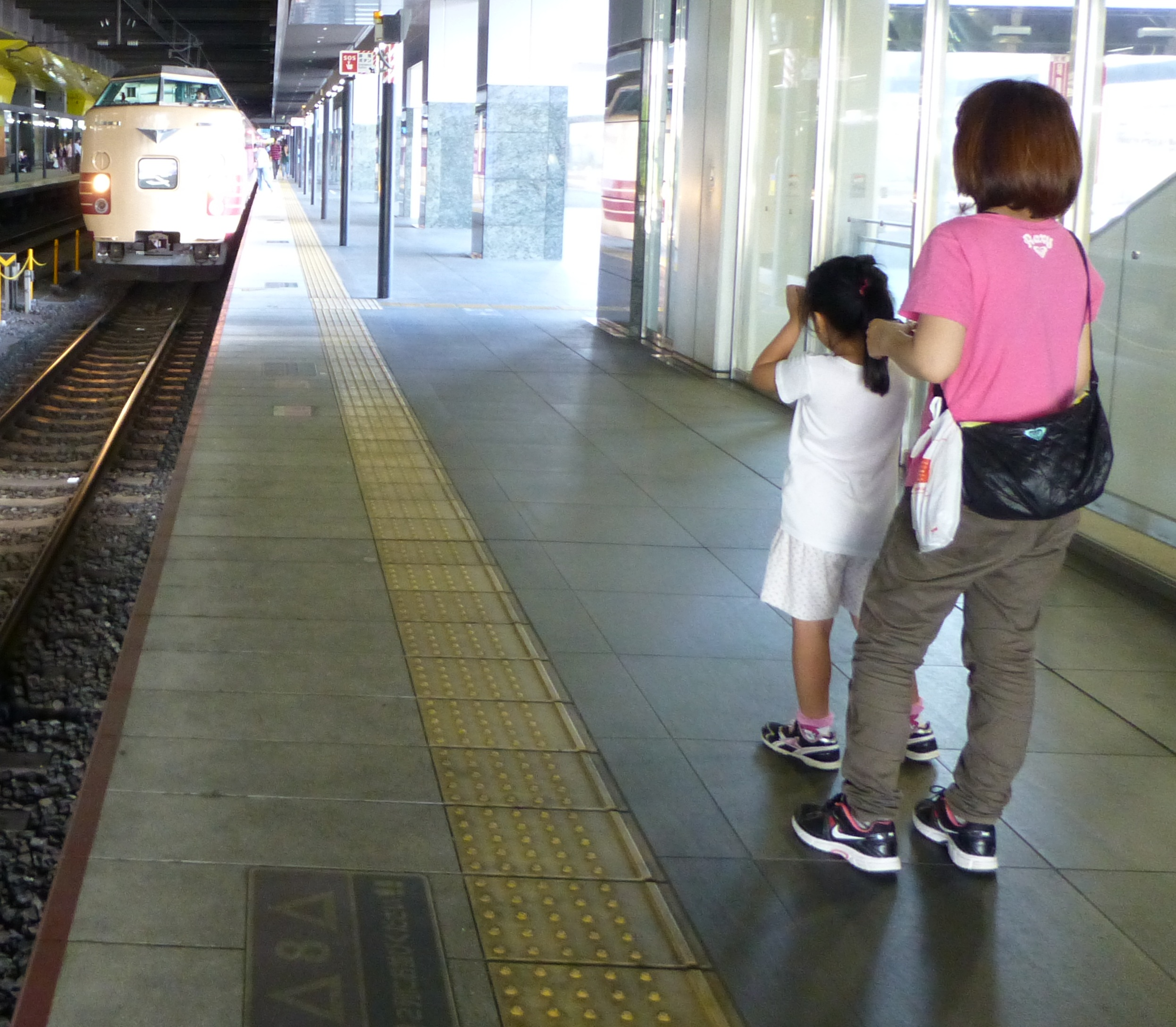 鉄道趣味の分野で、割かし新しいジャンルにママ鉄と言うものがある。